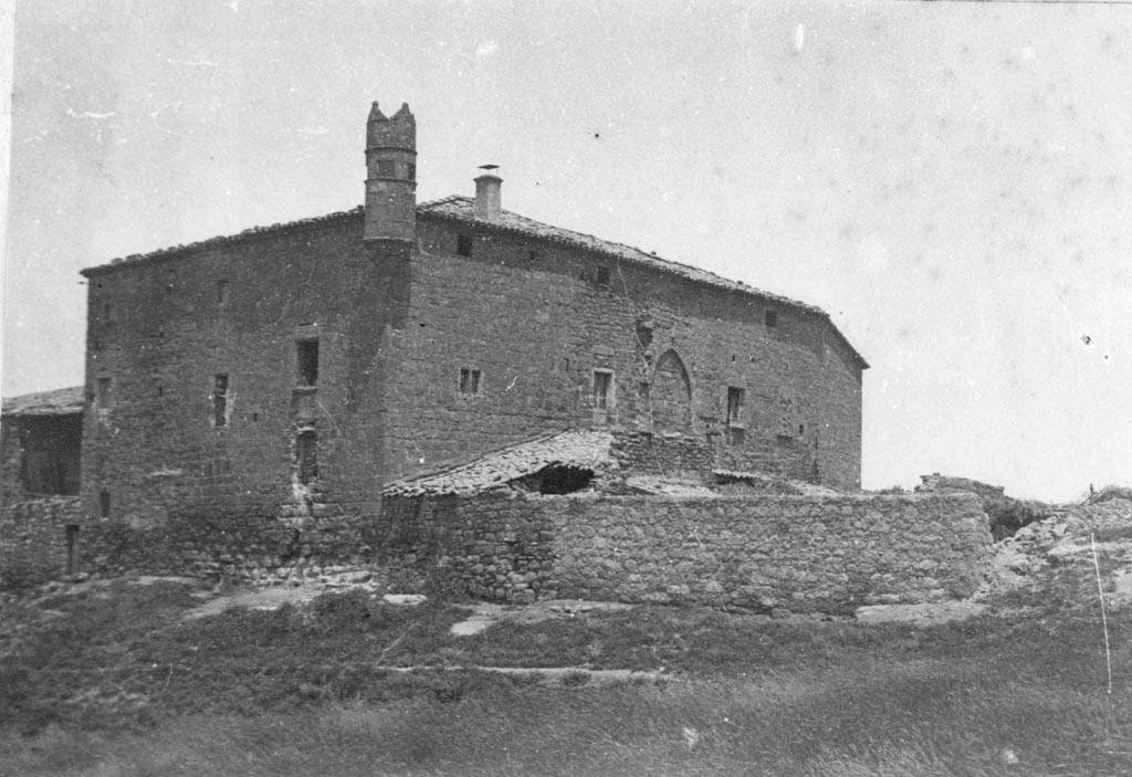 Castell de Sant Climent. Cèsar August Torras i Ferreri (Entre 1890 i 1923)